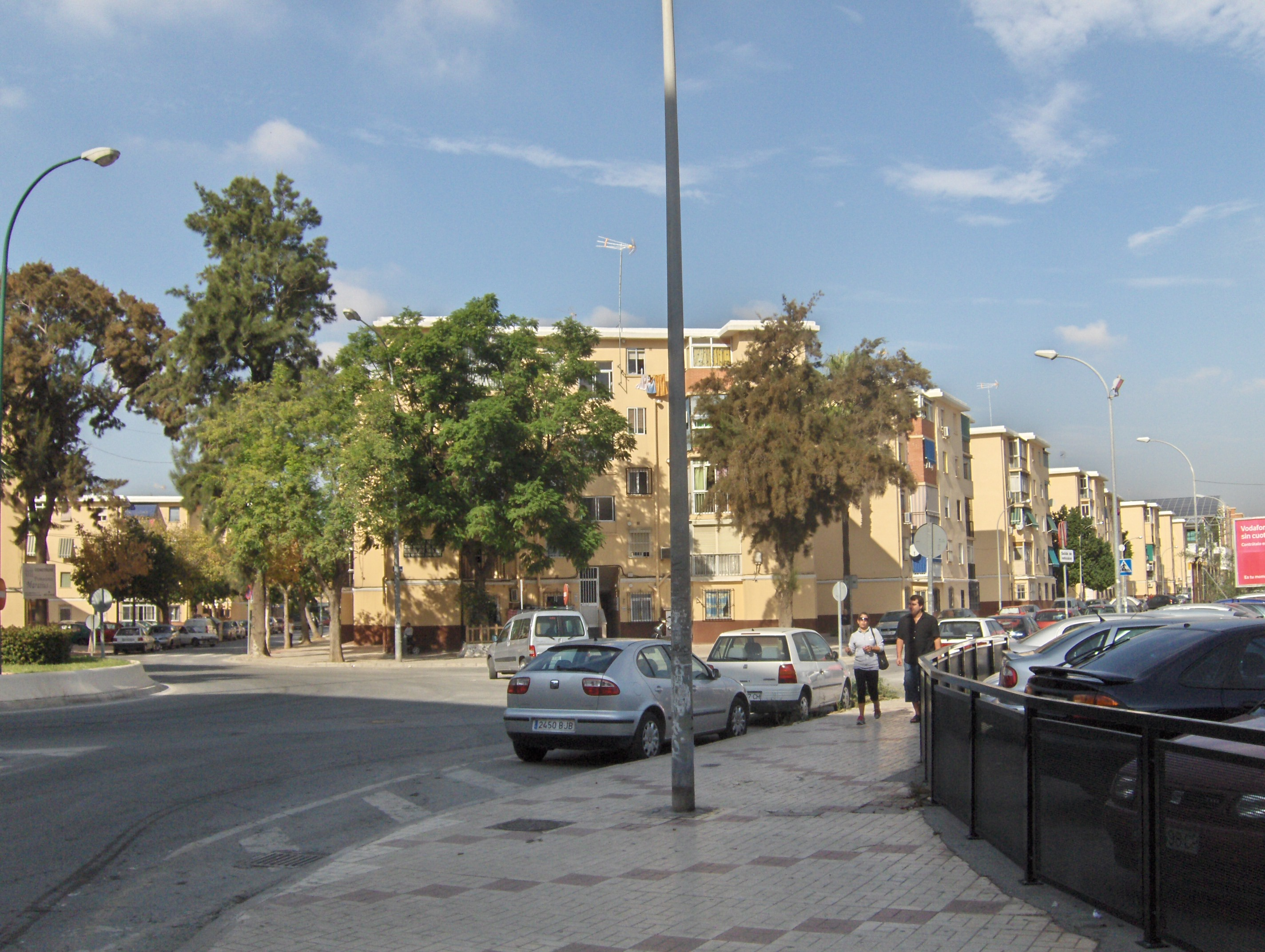 Barrio de Dos Hermanas, Málaga, España.